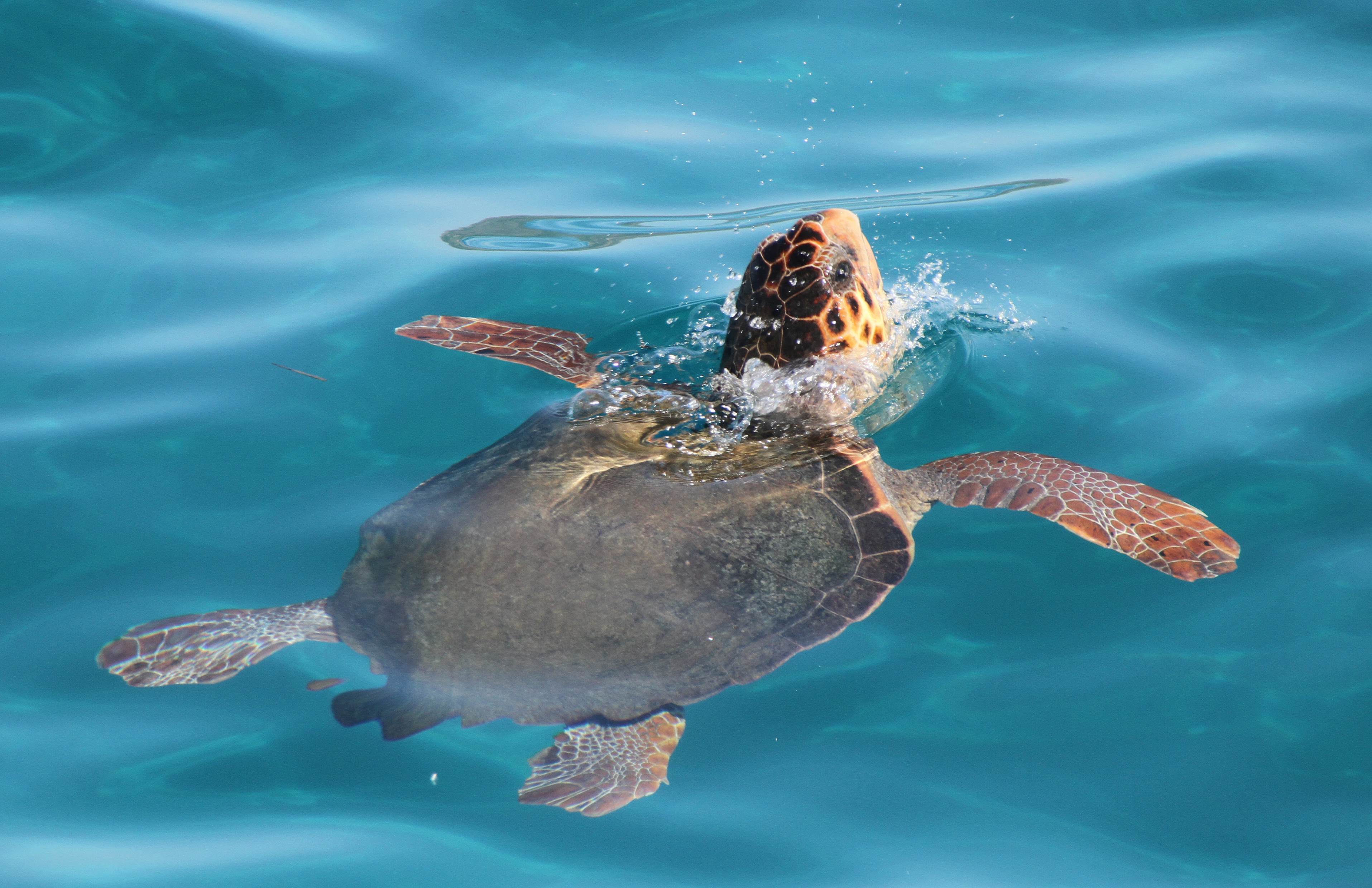 Loggerhead Turtle 1